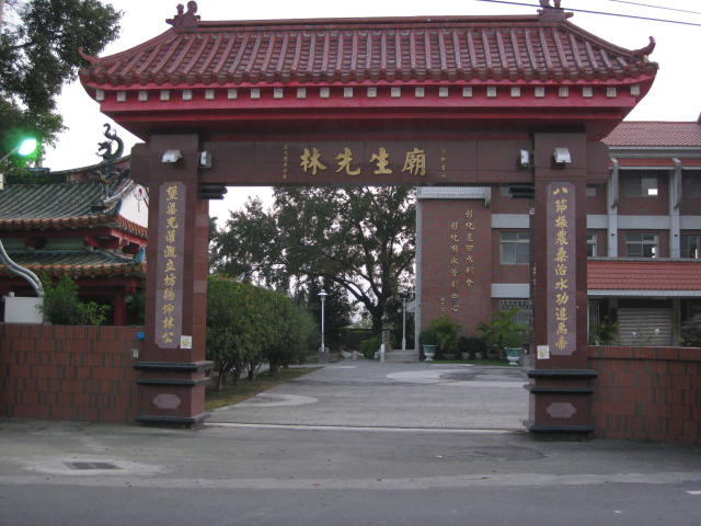 林先生廟,位於八堡一圳與二圳取水口旁